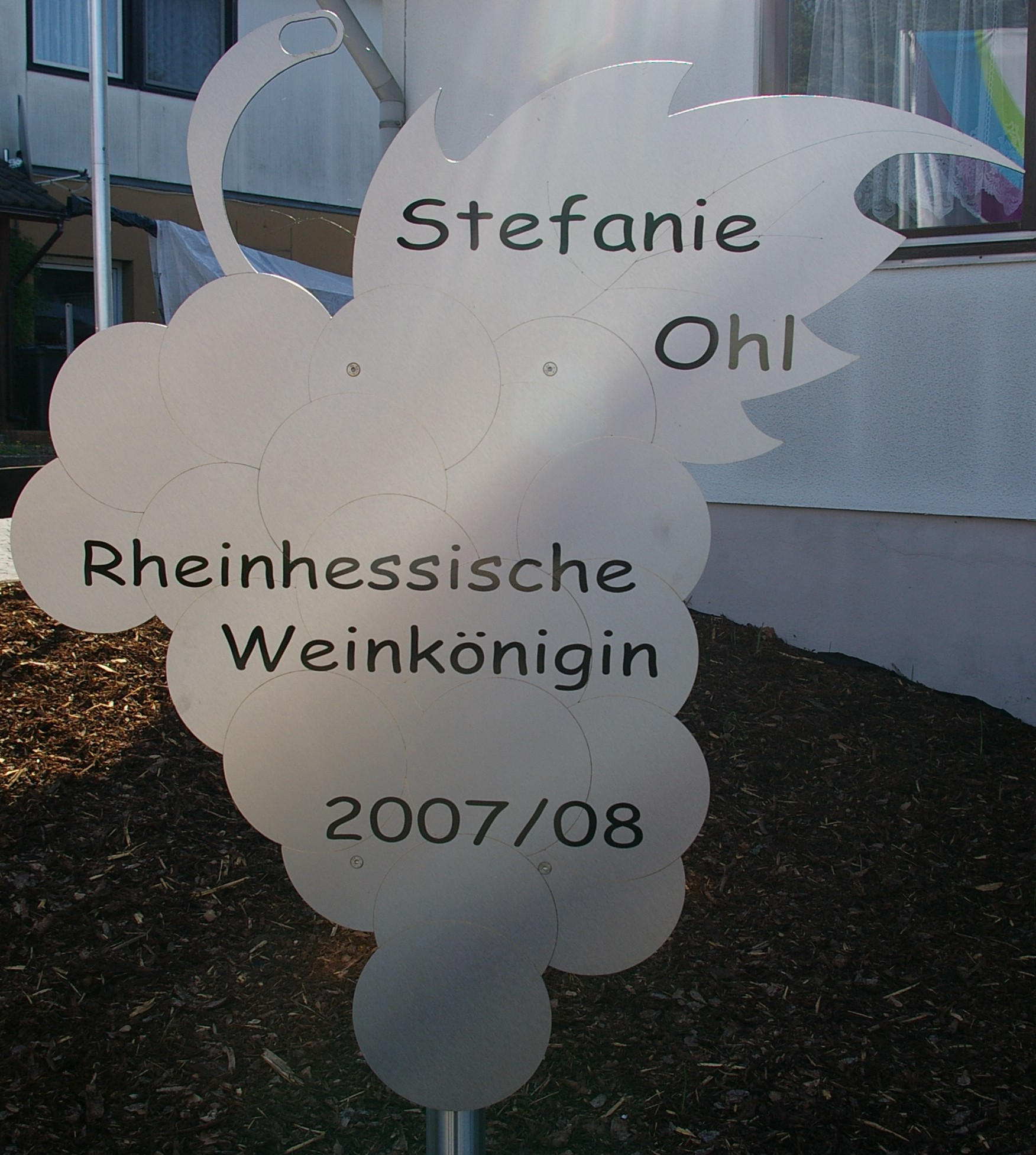 Panneau Reine du vin Rheinhessen